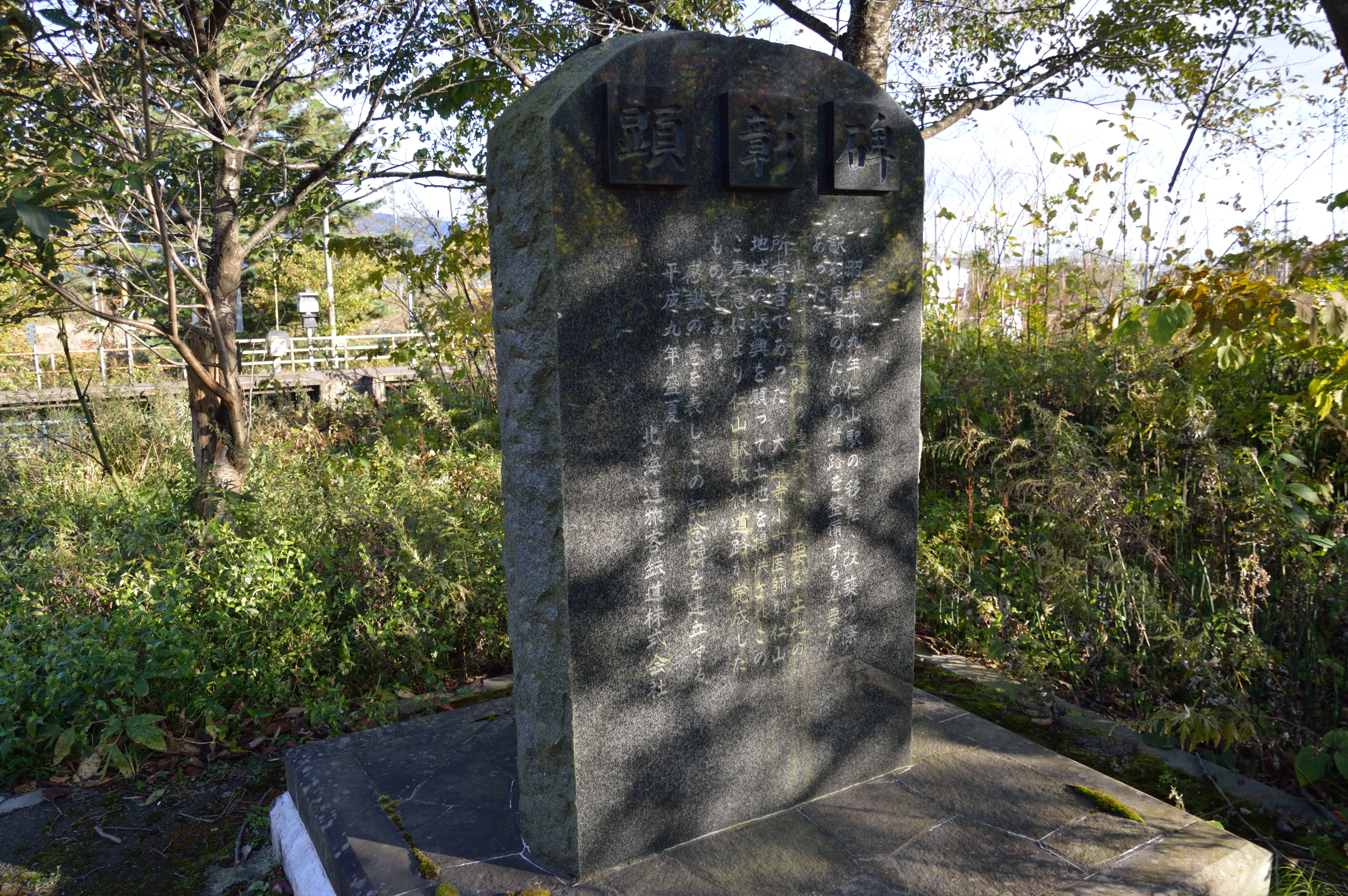 仁山駅構内の大道寺小市医師の顕彰碑